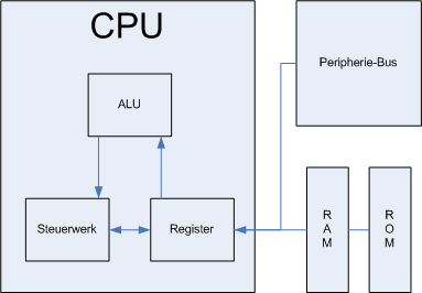 Schematische Darstellung eines von-Neumann-Zyklus